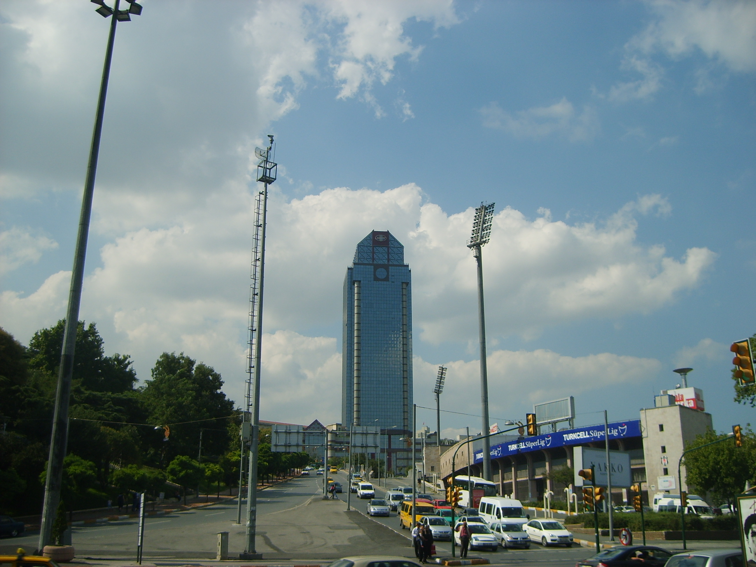 Bana ait. Licensing Kategori:İstanbul resimleri